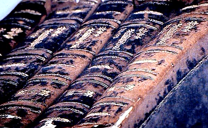 米欧回覧実記背表紙